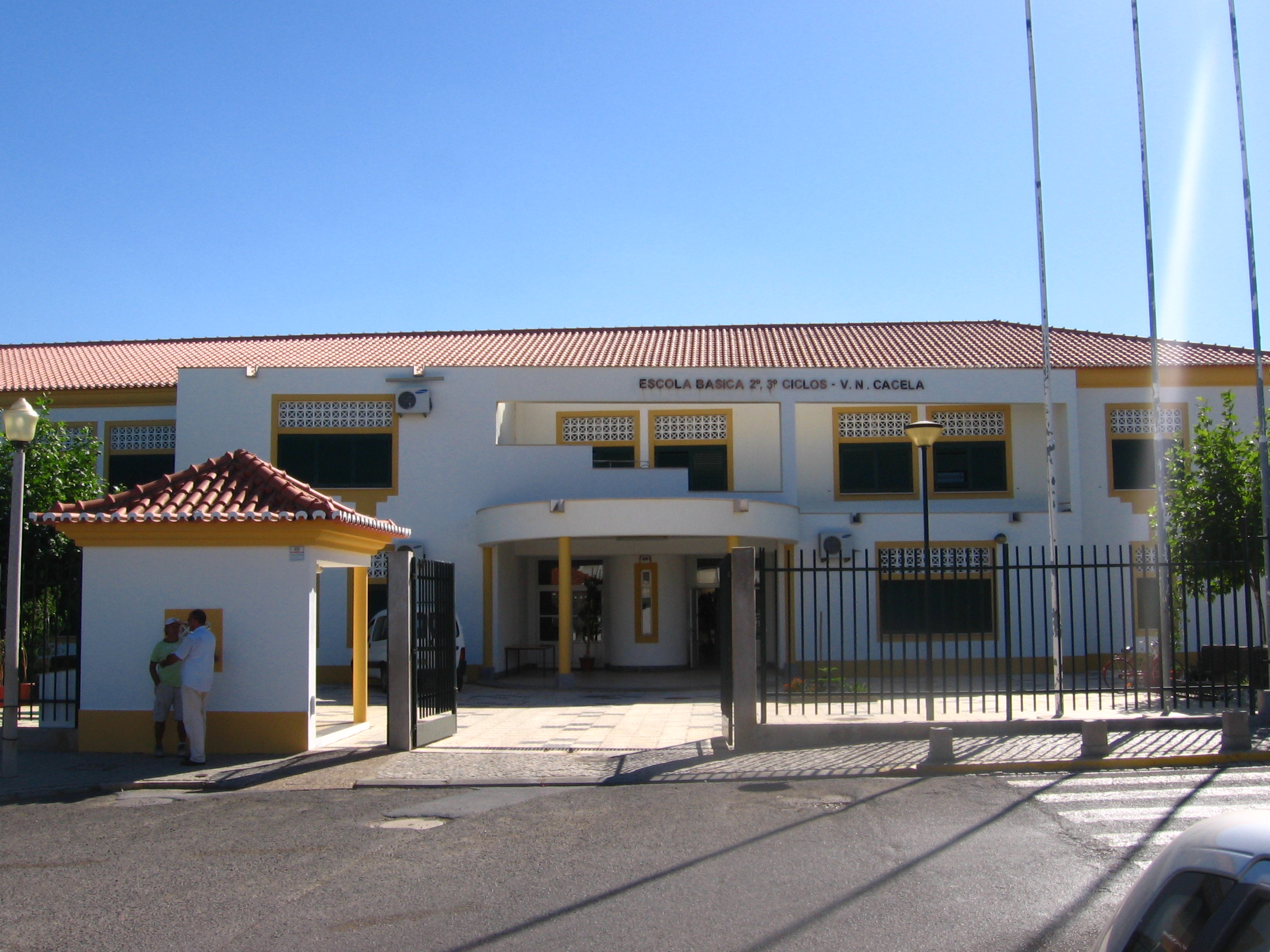 Escola Básica de 2º e 3º Ciclos de Vila Nova de Cacela, concelho de Vila Real de Santo António, Portugal